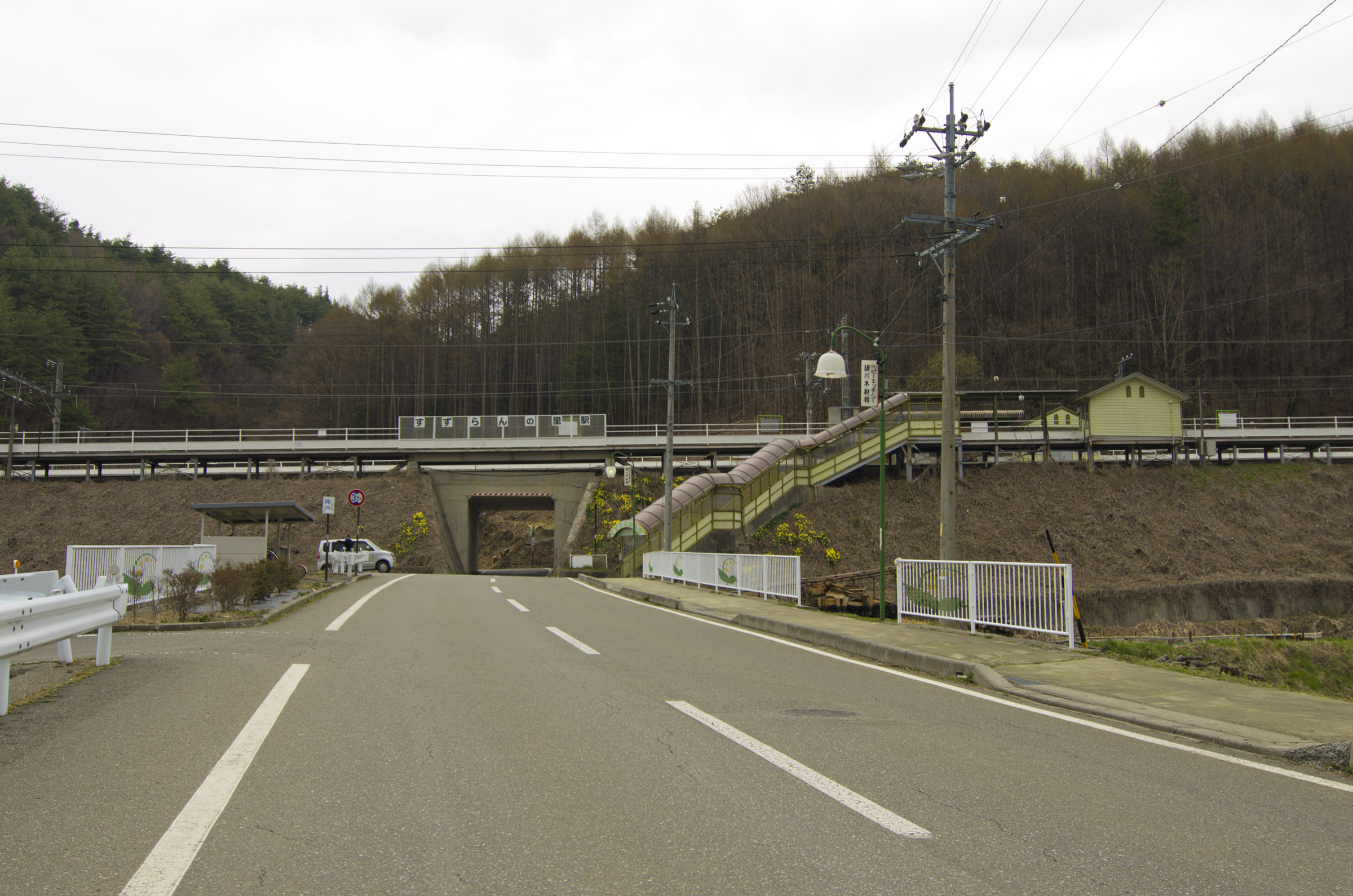 東日本旅客鉄道中央本線すずらんの里駅遠景